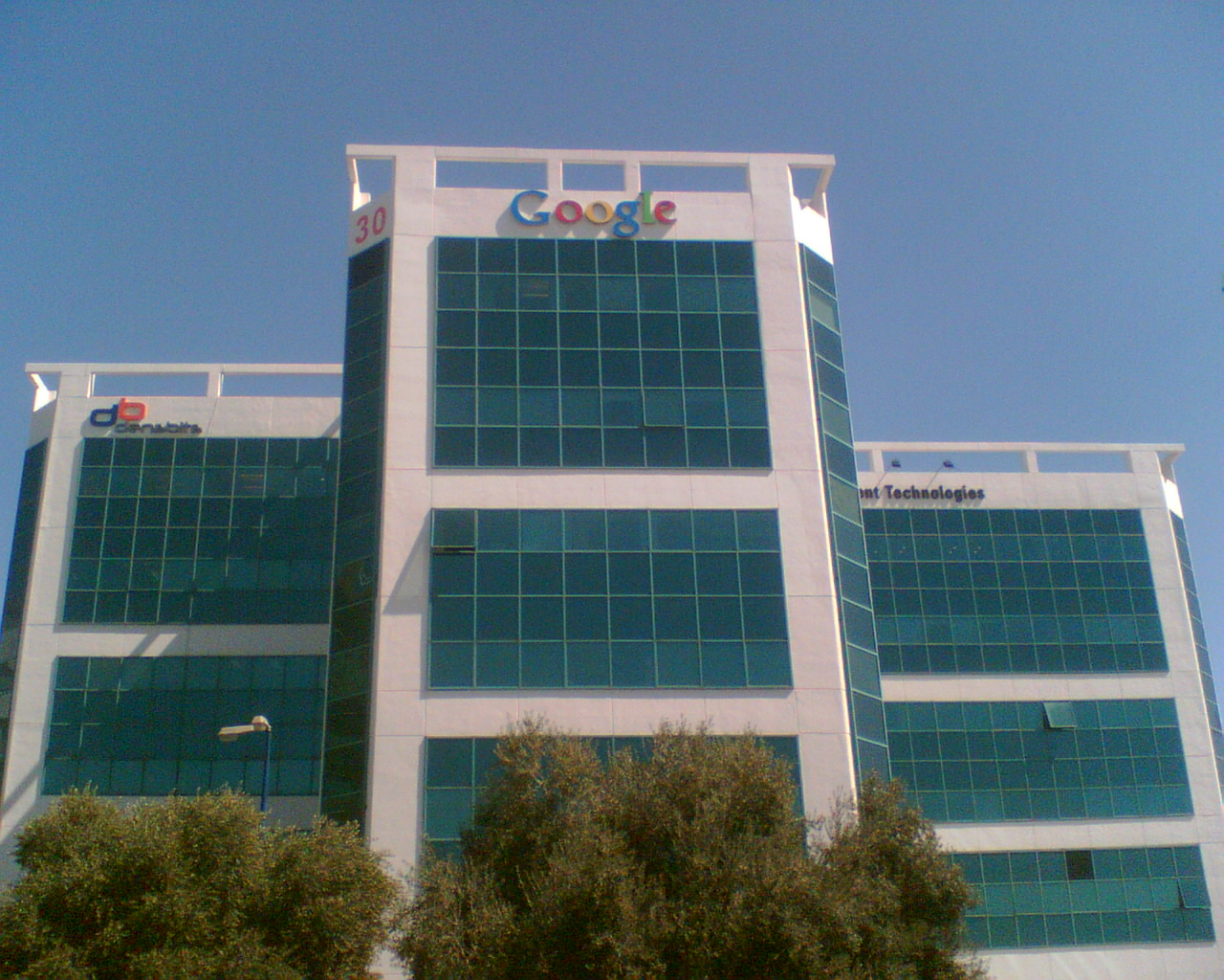 Google R&d center, Haifa